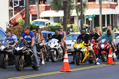 Black Bike Week Festival 2008